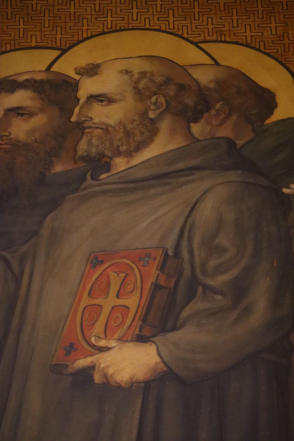 Le bienheureux Robert d'Arbrissel. Procession des saints de Bretagne. Diocèse de Rennes. Déambulatoire de la métropole Saint-Pierre de Rennes (35).